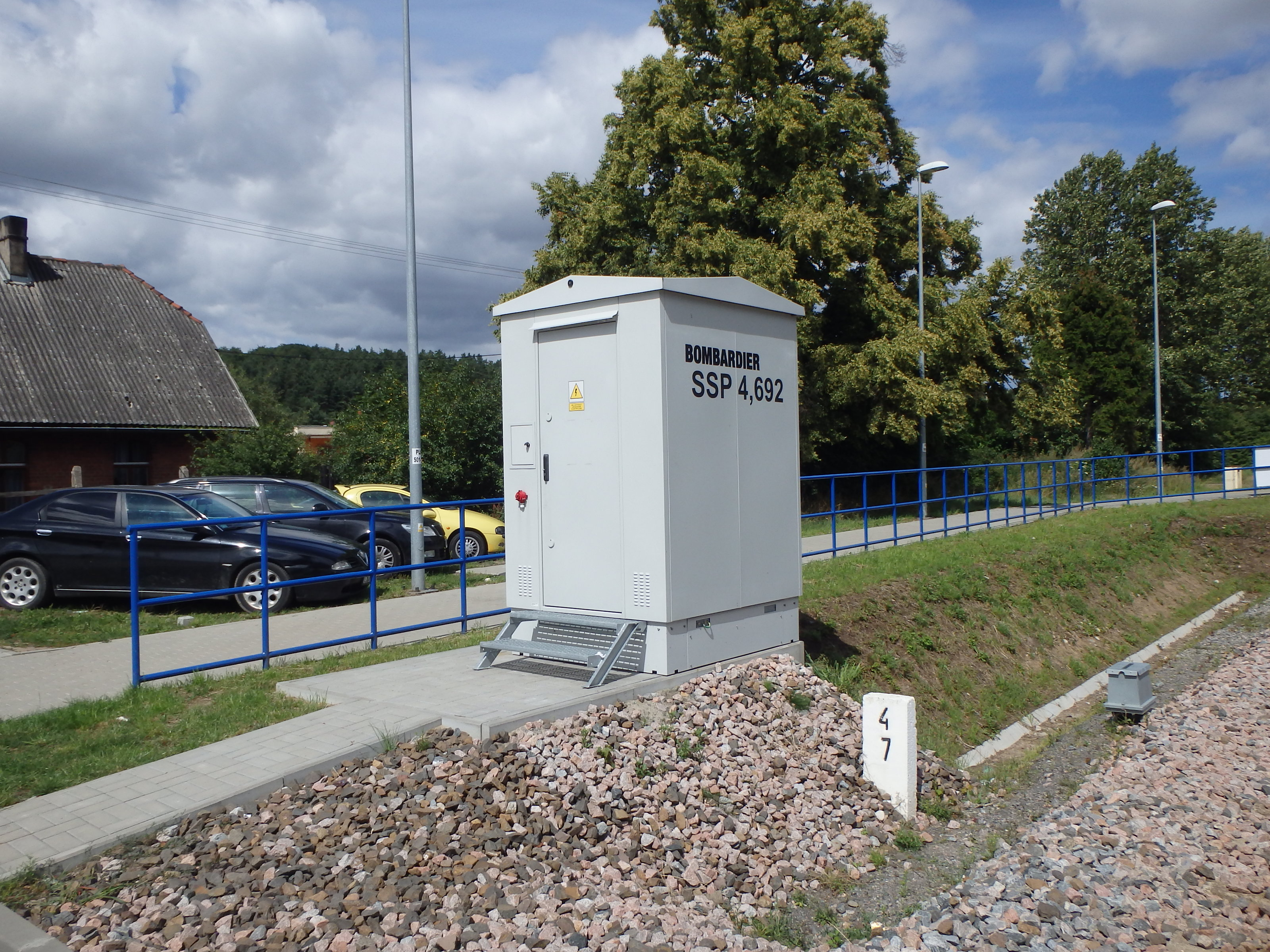 sterownik Samoczynnej Sygnalizacji Przejazdowej przejazdu kolejowego koło Redy Rekowa